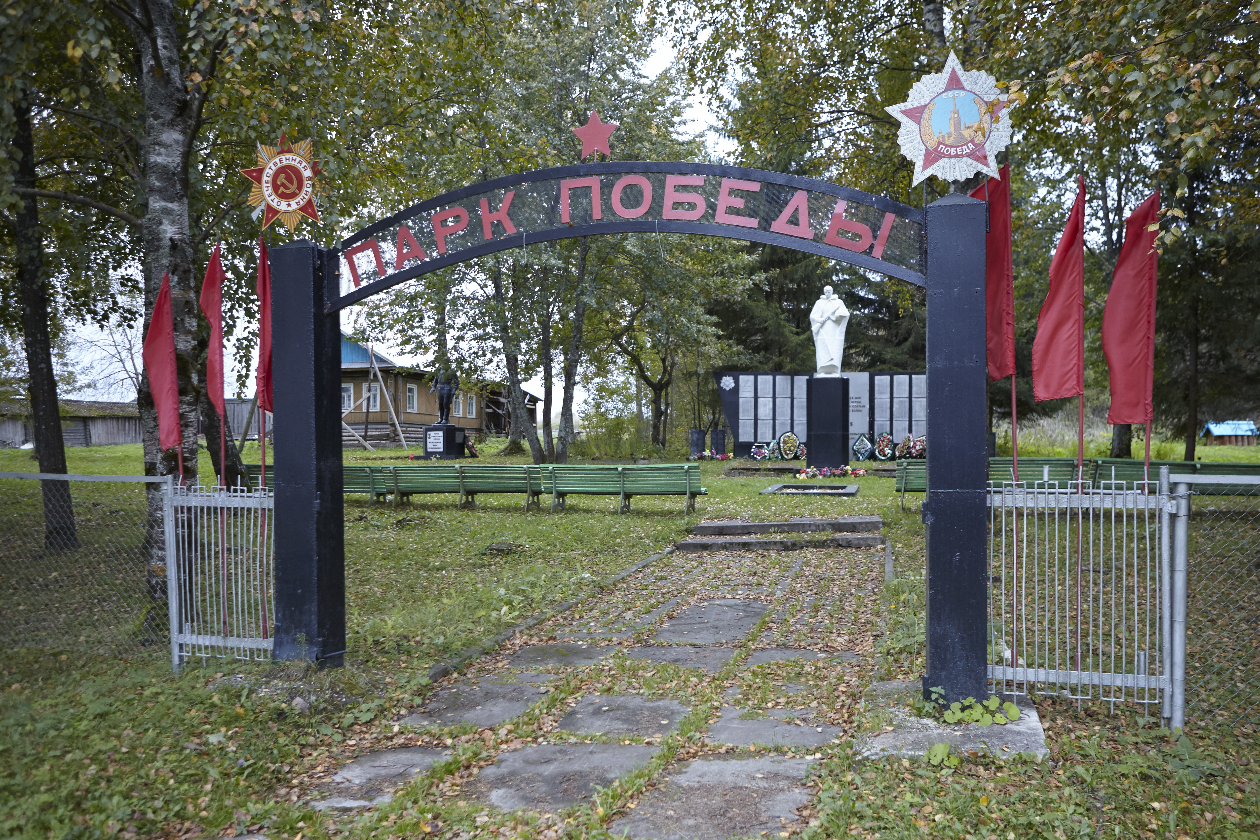 село Артюшино, Белозерский район, Вологодская область, Россия